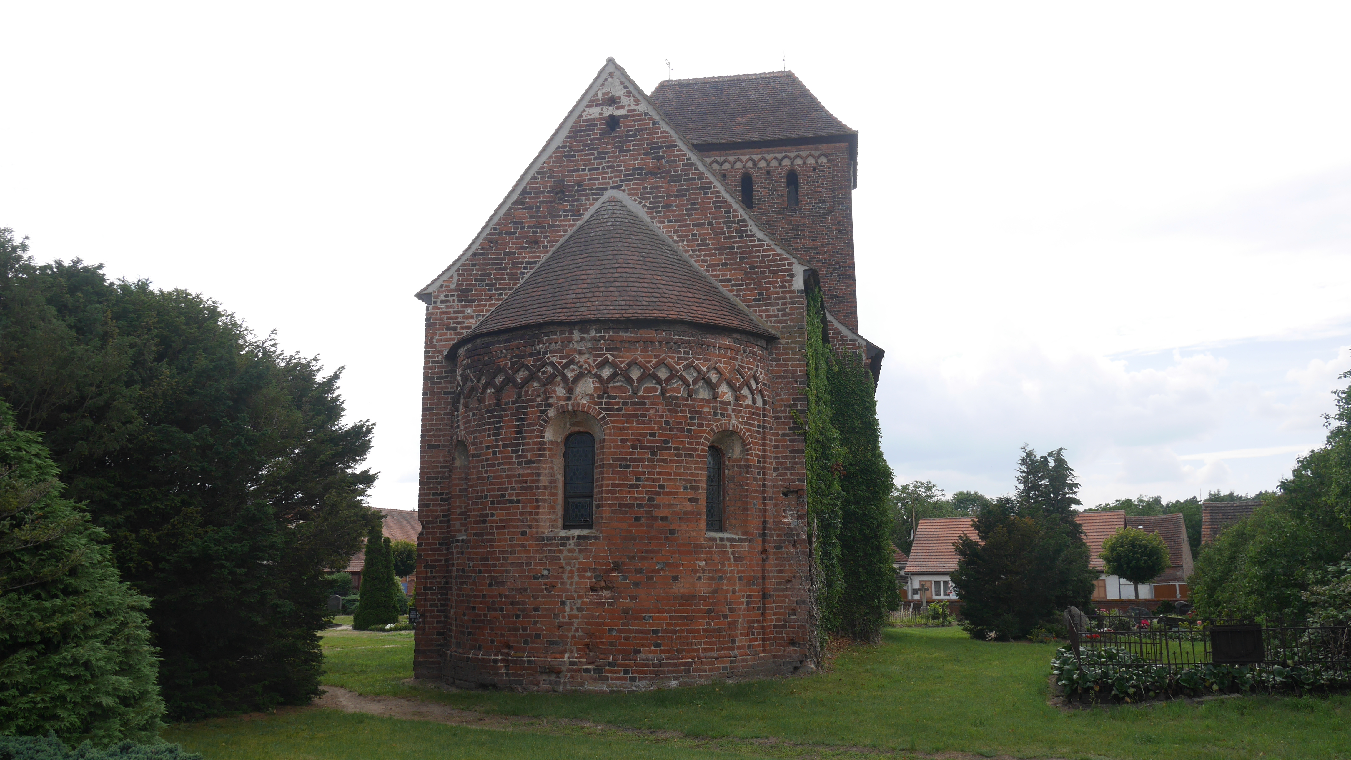 Dorfkirche Melkow Apsis